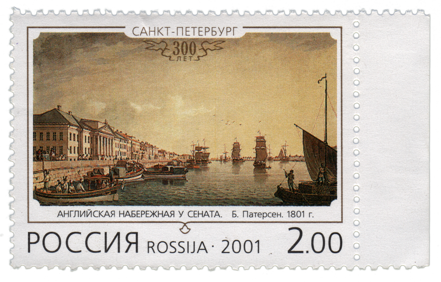 2-rubla Rusia poŝtmarko de la jaro 2001, dediĉita al la 300-jara jubileo de Sankt-Peterburgo. Ĝi montras la pentraĵon de Benjamin Patersen "Английская набережная у Сената" (Angla kajo ĉe la Senatejo).